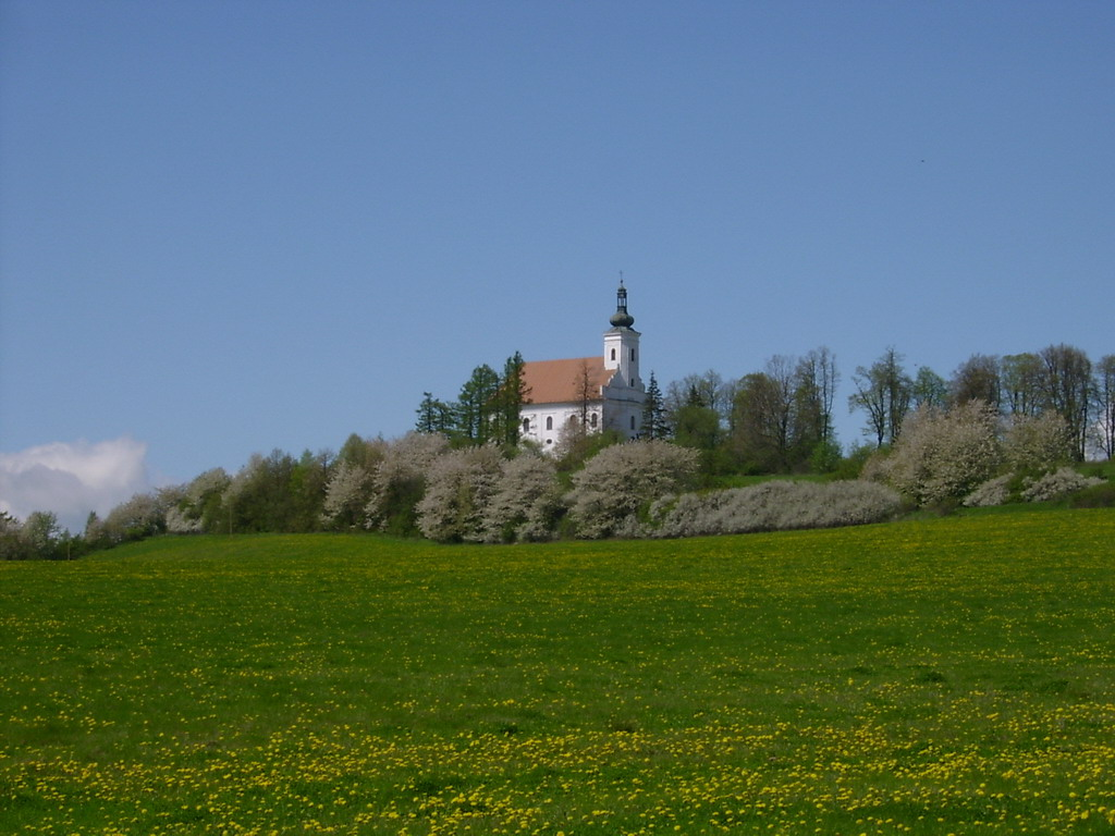 Uhlířský vrch